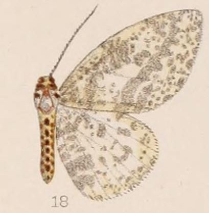 Abraxas poliostrota Hampson 1907